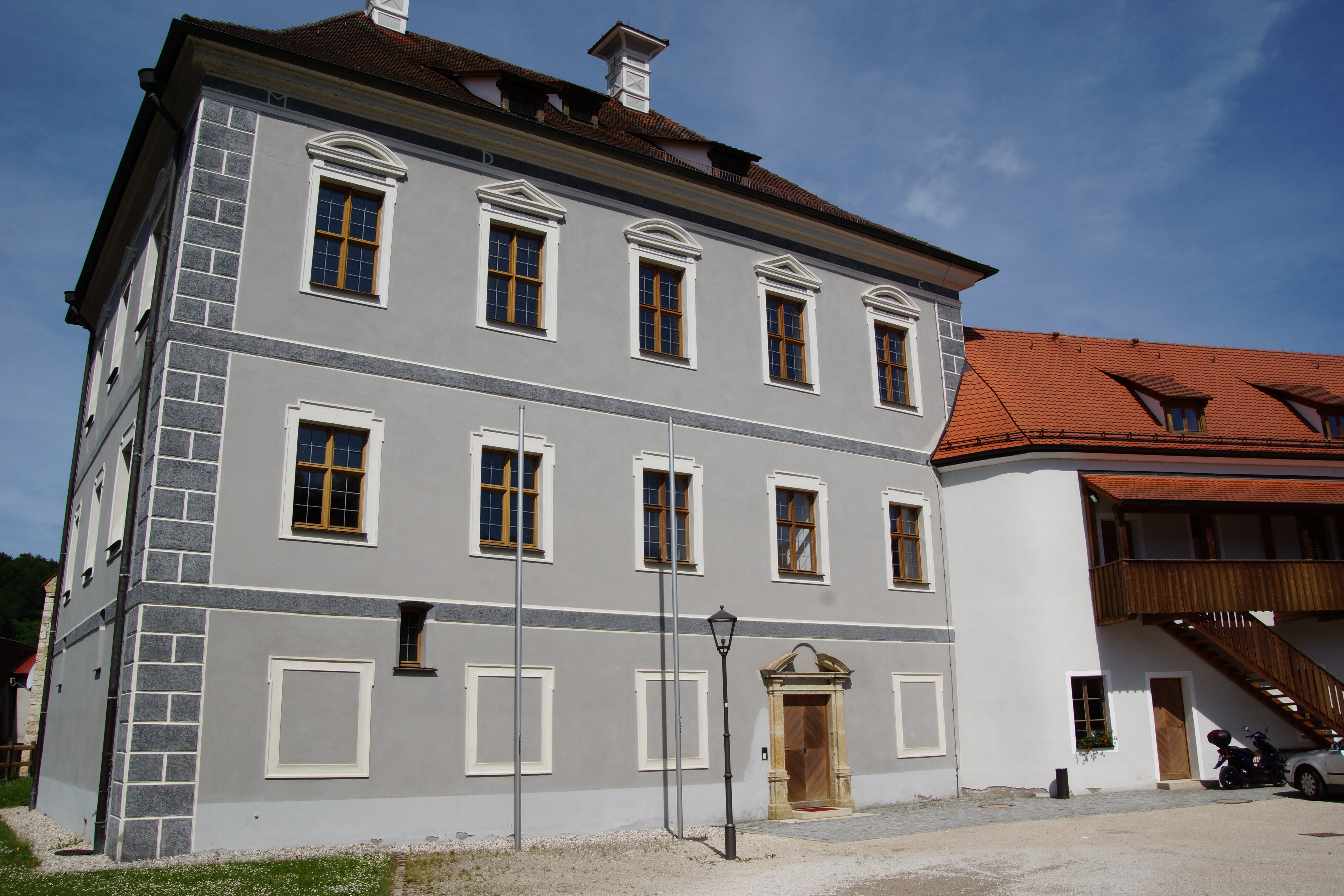 Das Hammerschloss oder auch Untere Schloss im Oberpfälzischen Markt Schmidmühlen